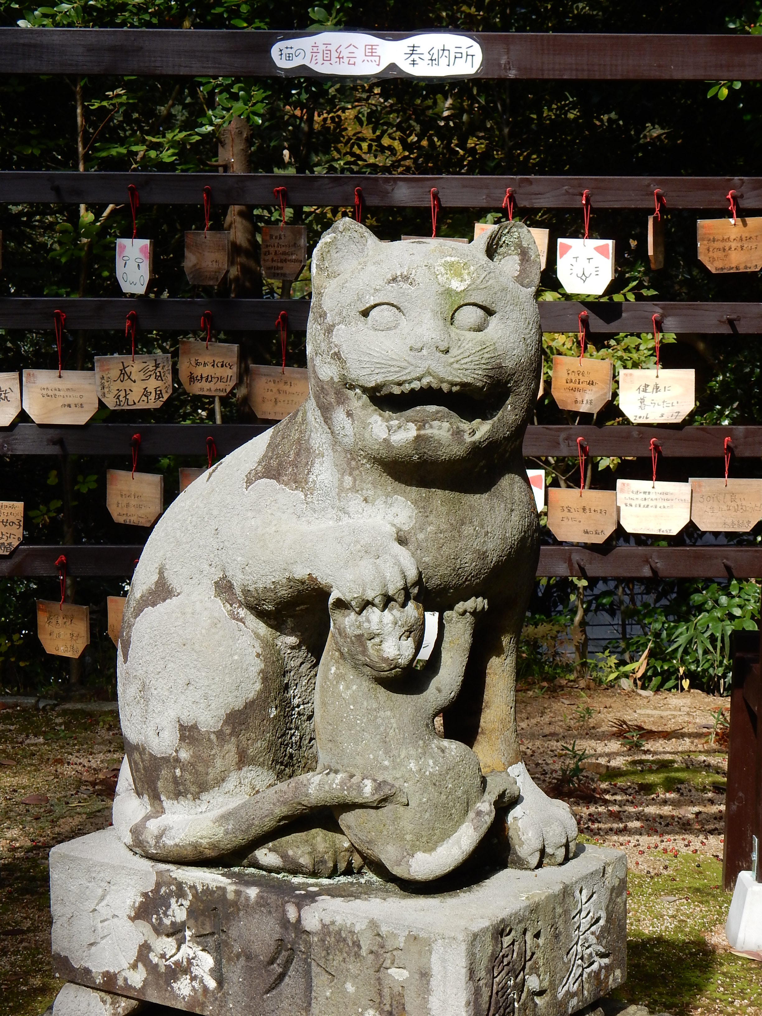 京丹後市峰山町泉に所在する金刀比羅神社の末社である木島神社に奉納された「狛猫」。